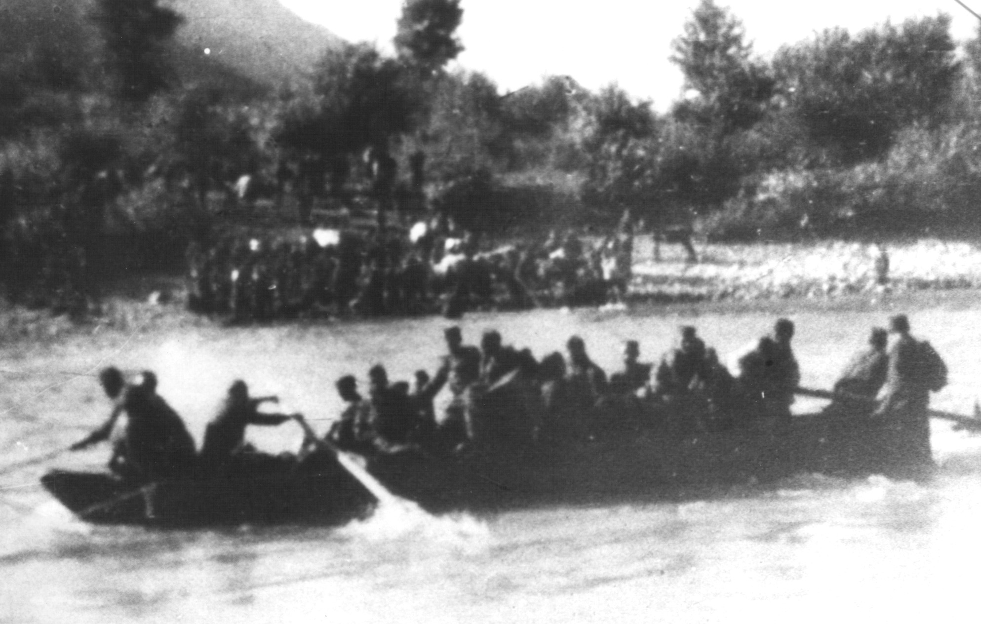 Srpskohrvatski / српскохрватски: Borci 12. vojvođanskog korpusa prelaze iz Bosne u Srbiju preko Drine, 5,6. septembra 1944. godine.